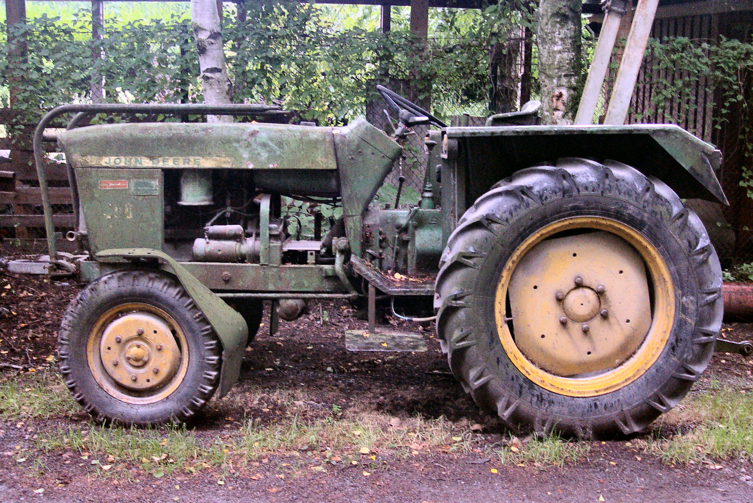 Ein älterer John Deere - Traktor.